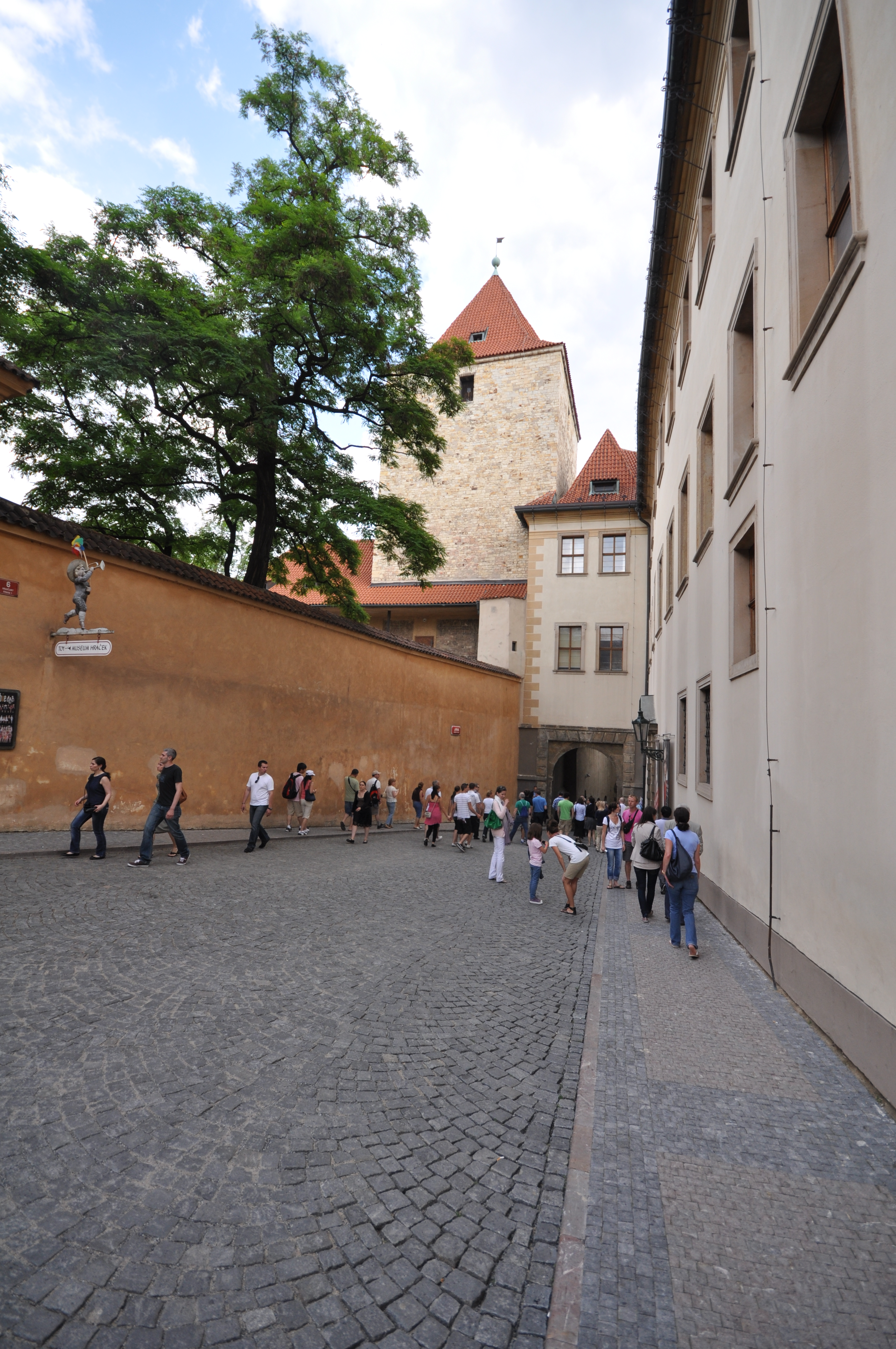 Prag